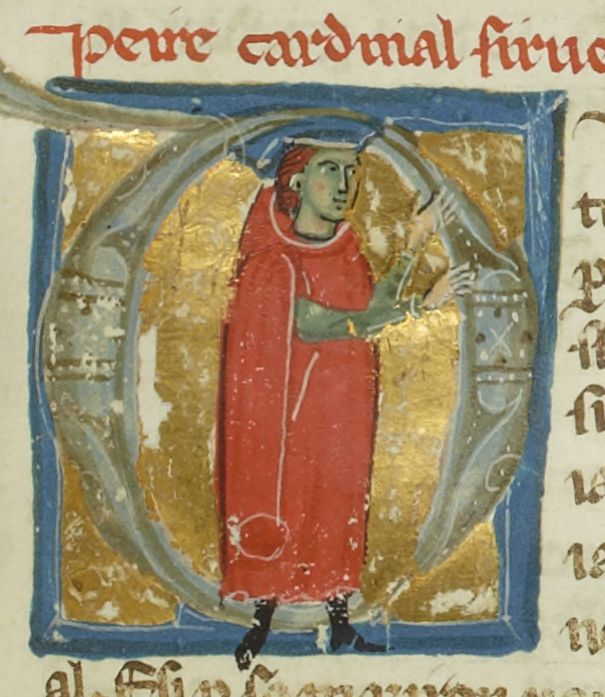 Lettrine enluminée représentant le troubadour Peire Cardenal, dans un manuscrit du XIIIe siècle (Recueil des poésies des troubadours contenant leurs vies, Gallica. Source : Bibliothèque nationale de France, Département des manuscrits, Français 854, folio 164r.)